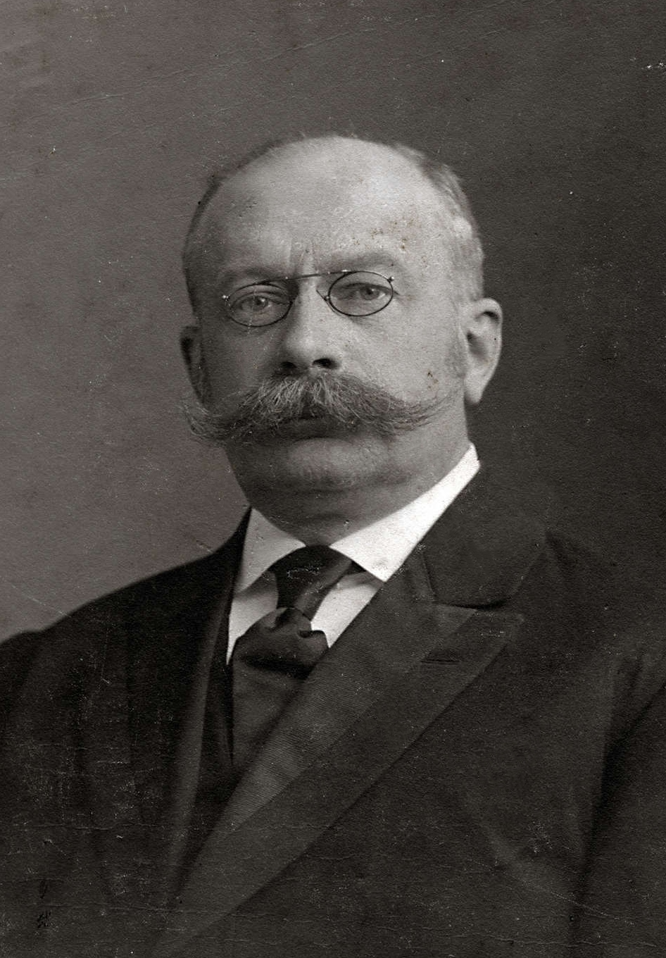 Mr. J.E. Heeres, lid van de Liberale Unie, nieuw verkozen tot lid van te Tweede Kamer voor het kiesdistrict Leiden bij de verkiezingen van 1913.